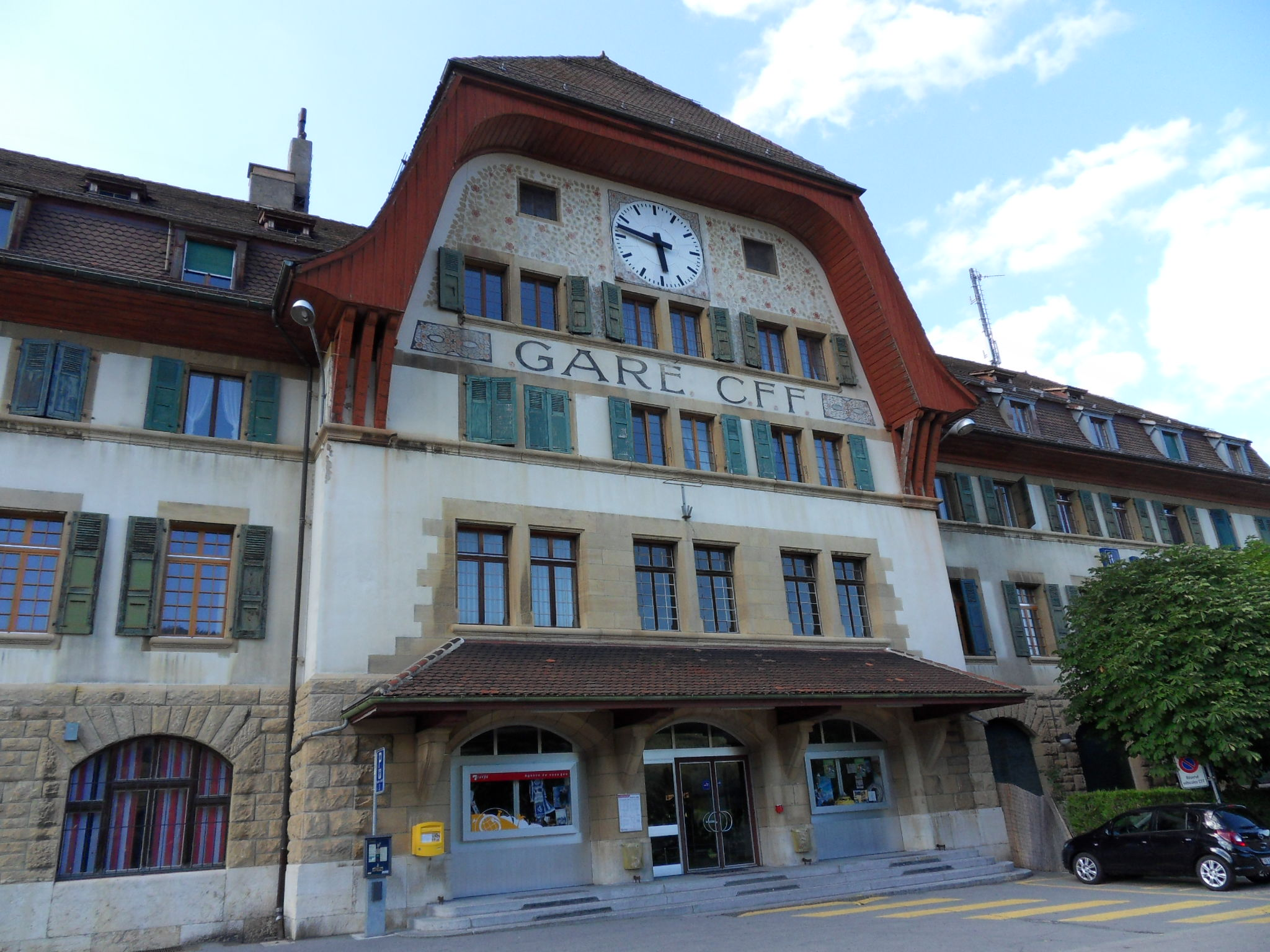 Gare de Vallorbe (Suisse). Ligne de Dole à Vallorbe. Ligne Dijon-Ville - Vallorbe (frontière) : Le bâtiment voyageurs